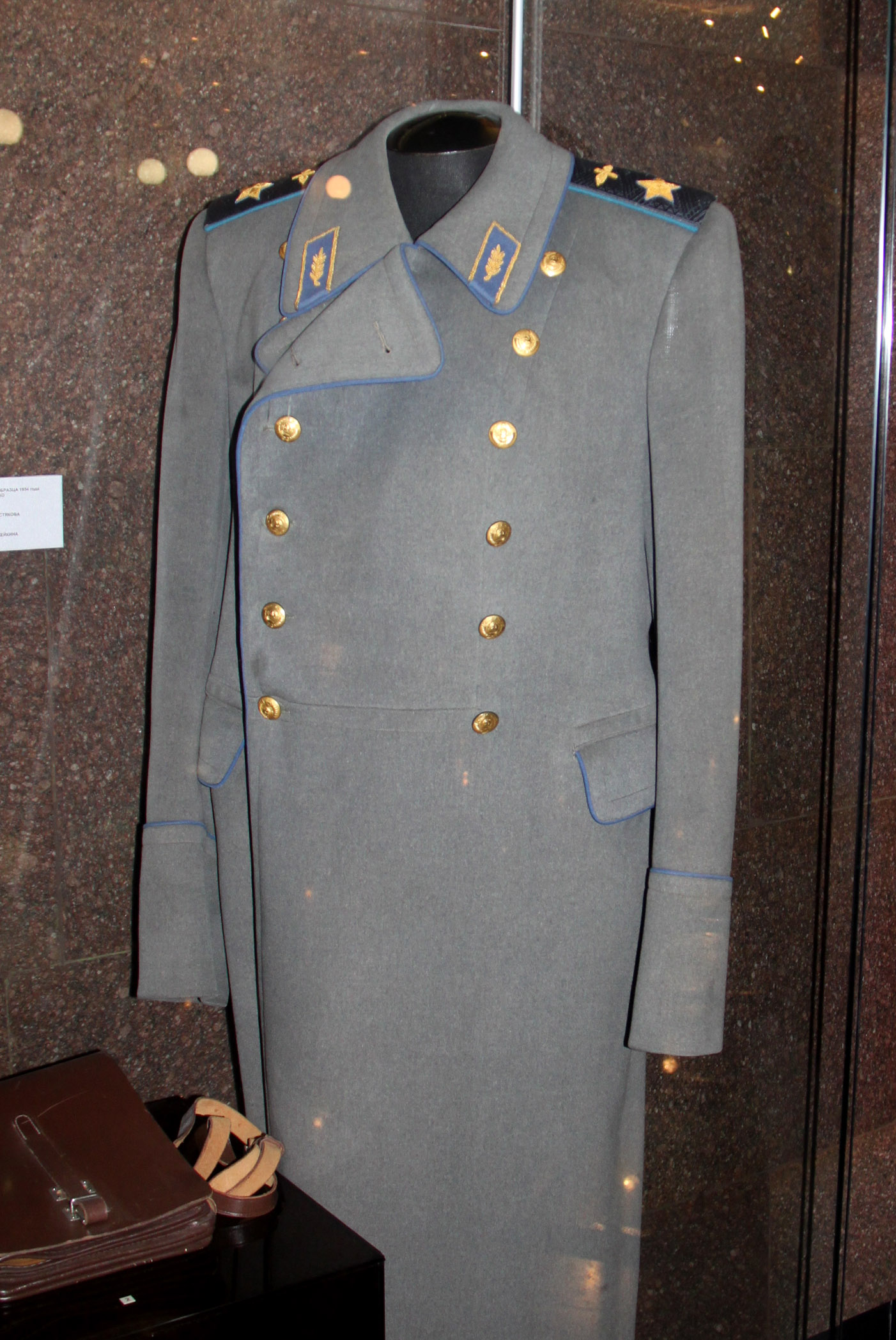 Шинель образца 1943 года Маршала авиации Г.А. Ворожейкина